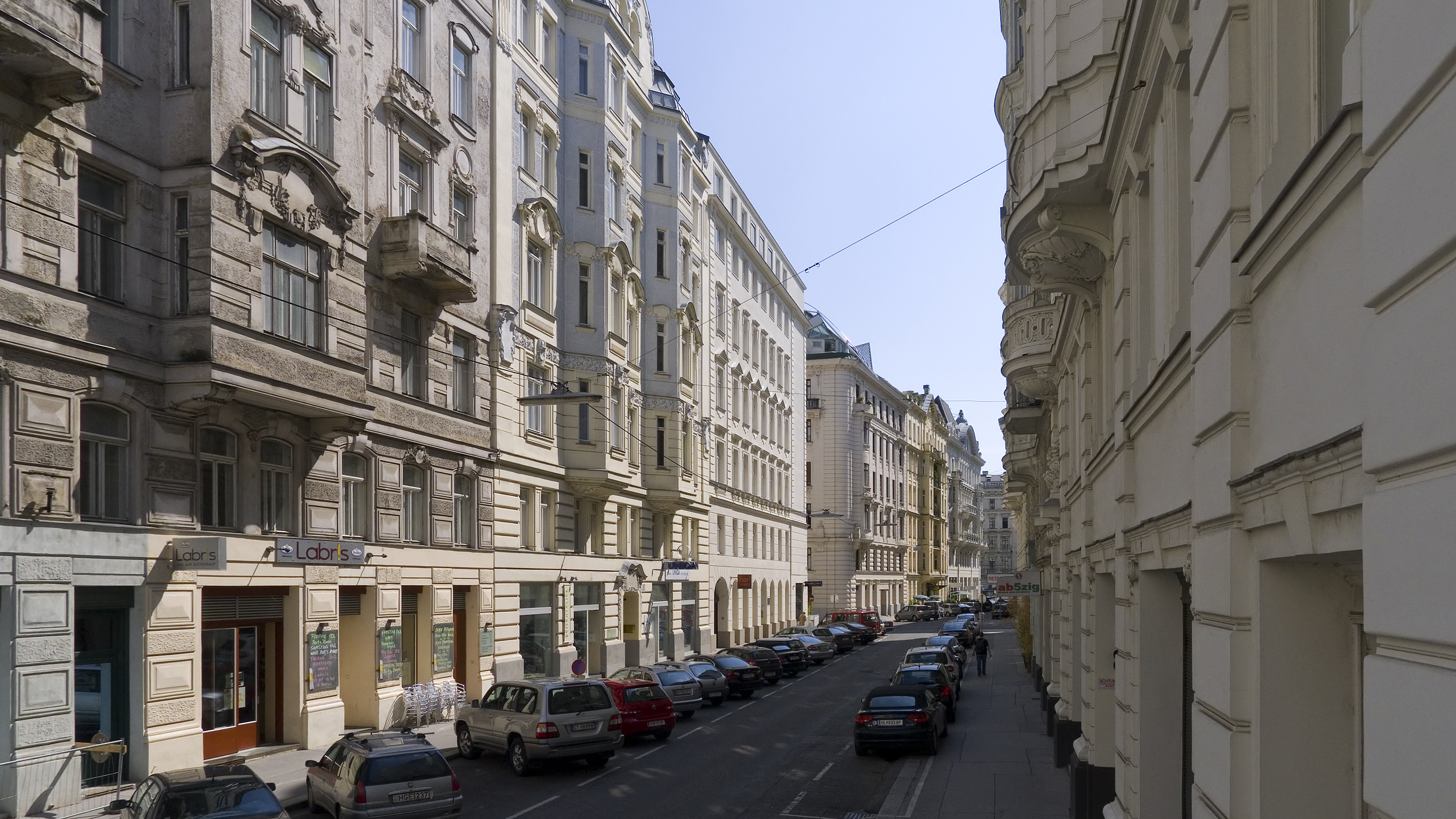 Die Biberstraße in Wien 1 bei der Rosenbursenstraße Richtung Südwesten